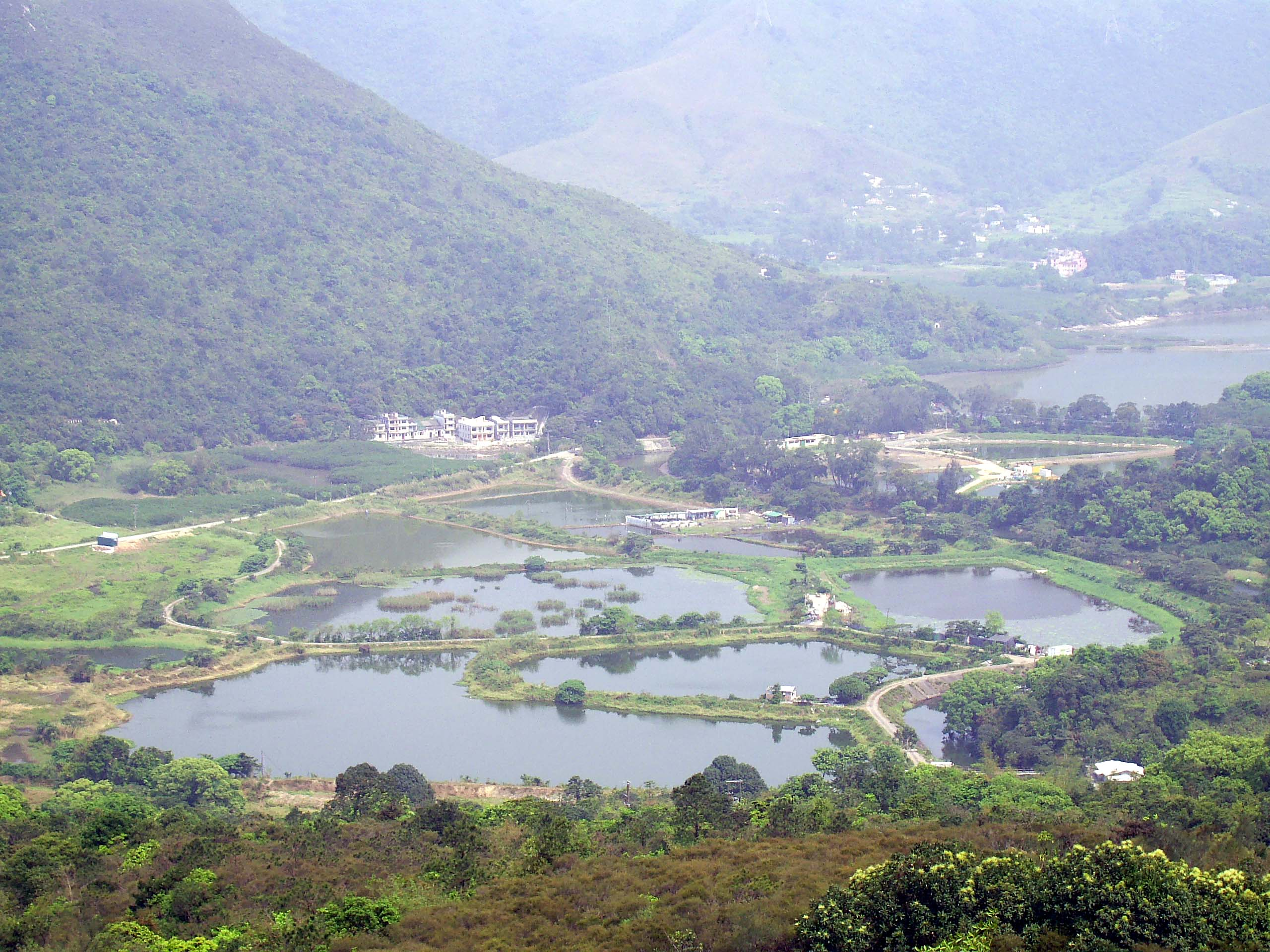 中文（香港）: 南涌